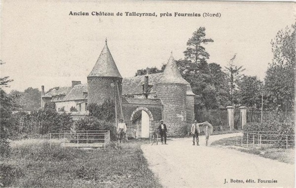 Pont-de-Sains (commune de Sains -du-Nord, France), propriété de Catherine Noël Worlee épouse de Charles-Maurice de Talleyrand-Périgord